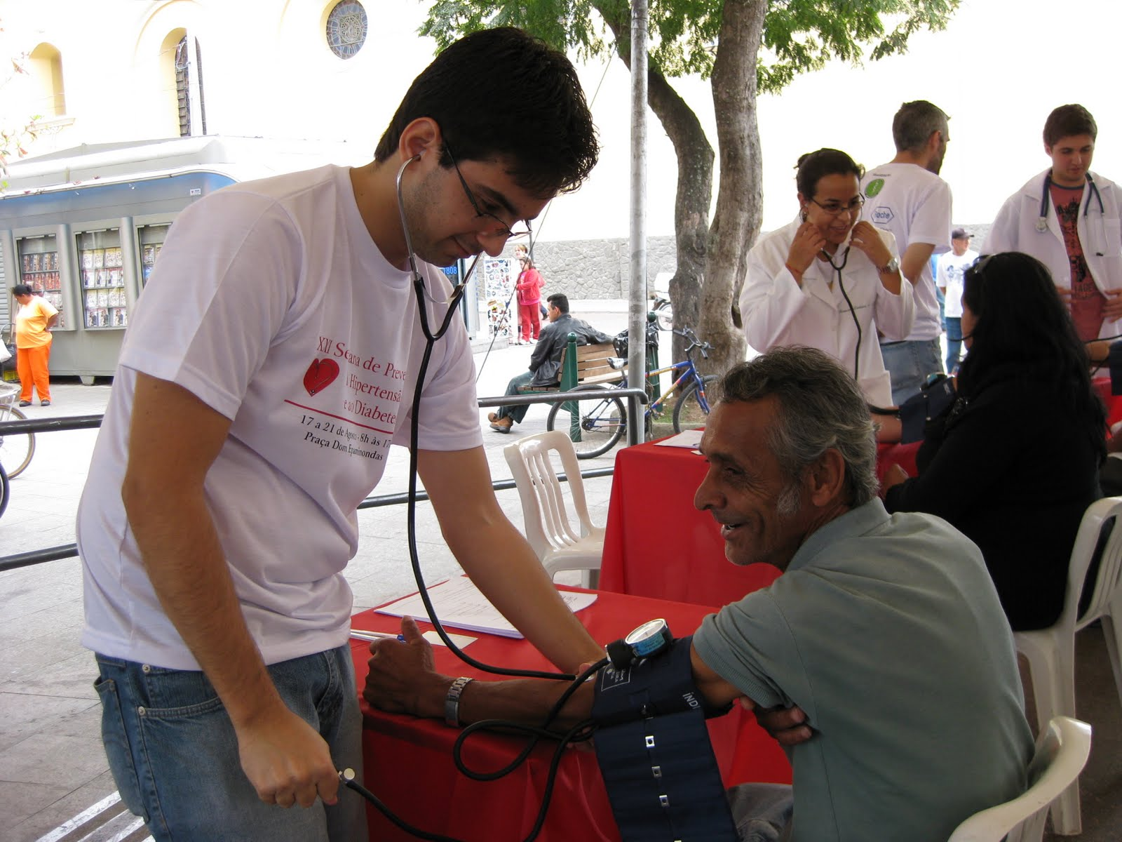 semana da hipertensao - dcbm - Faculdade de Medicina de Taubaté